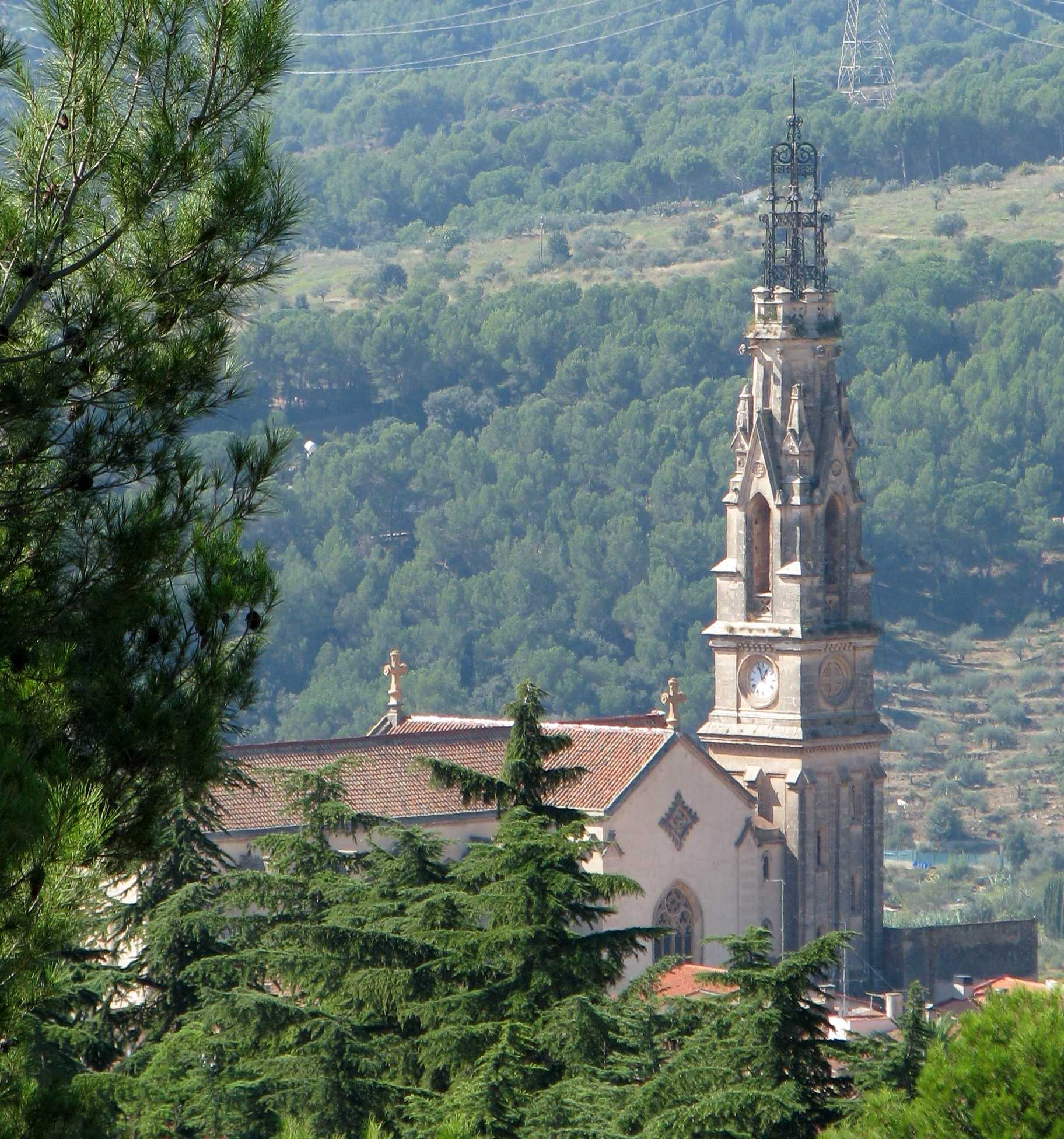 Iglesia de Castellar del Vallès, vista trasera